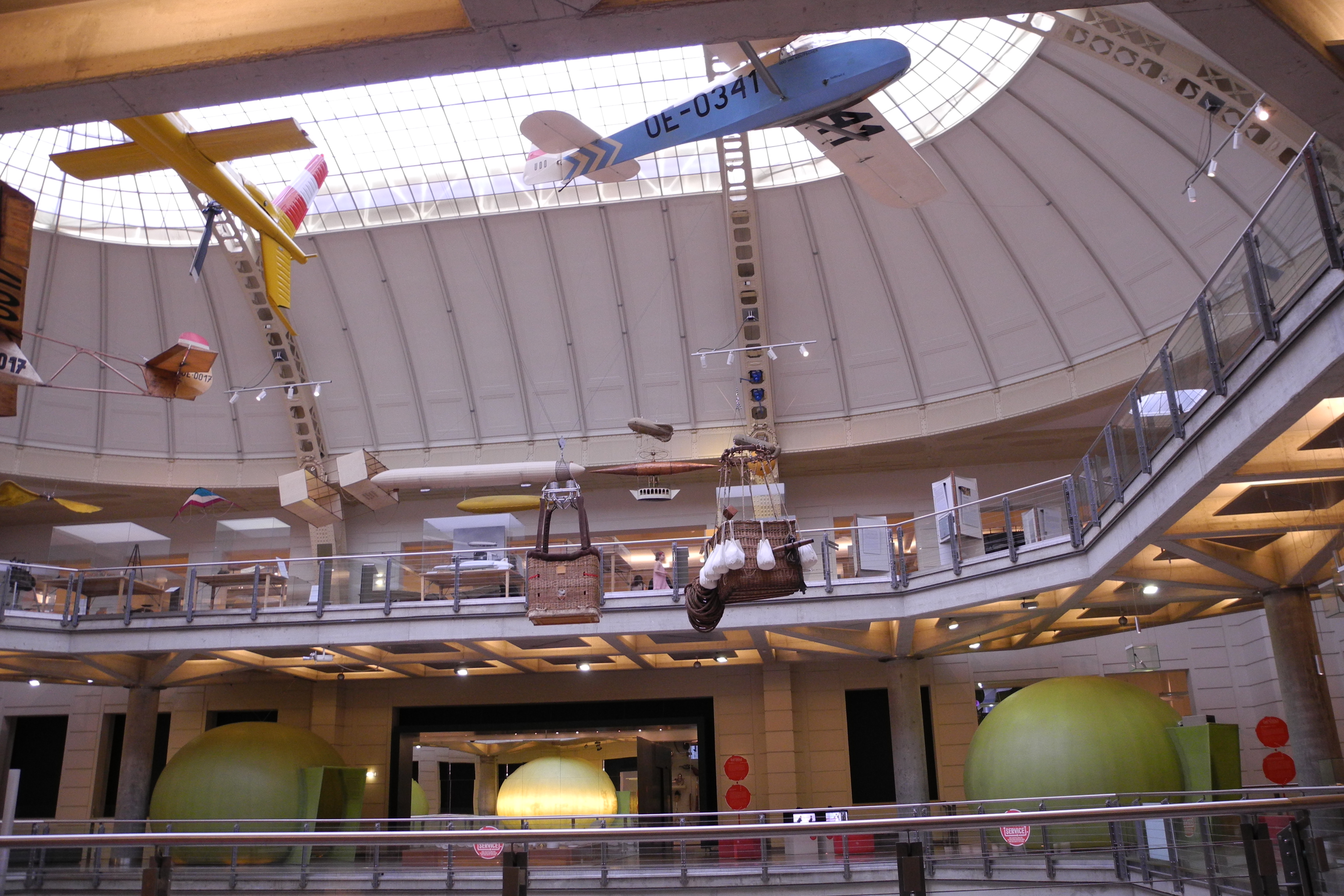 Halle - Technisches Museum